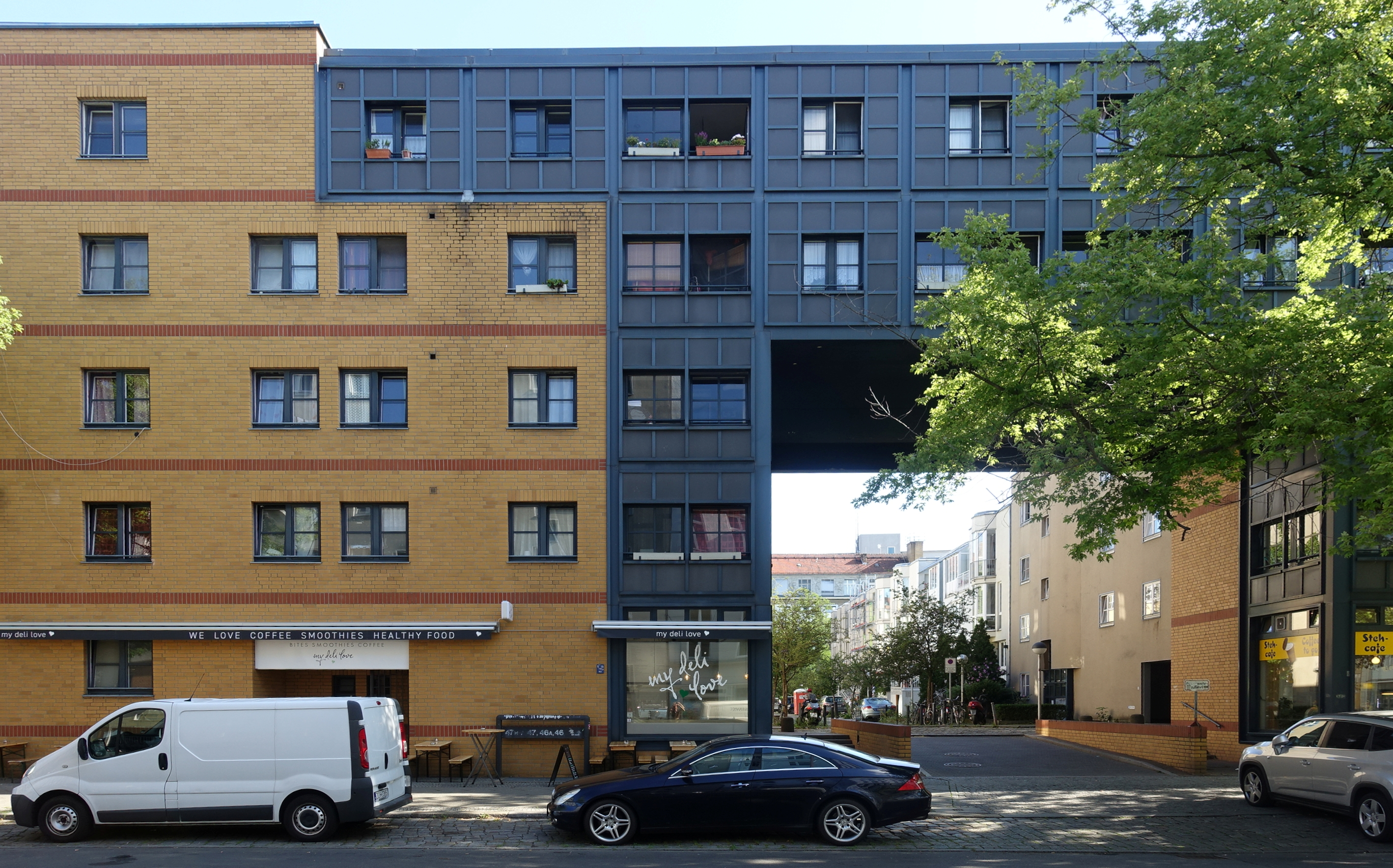 Die Torhäuser Lützowstraße 44, 46, 48, 50 in Berlin-Tiergarten.